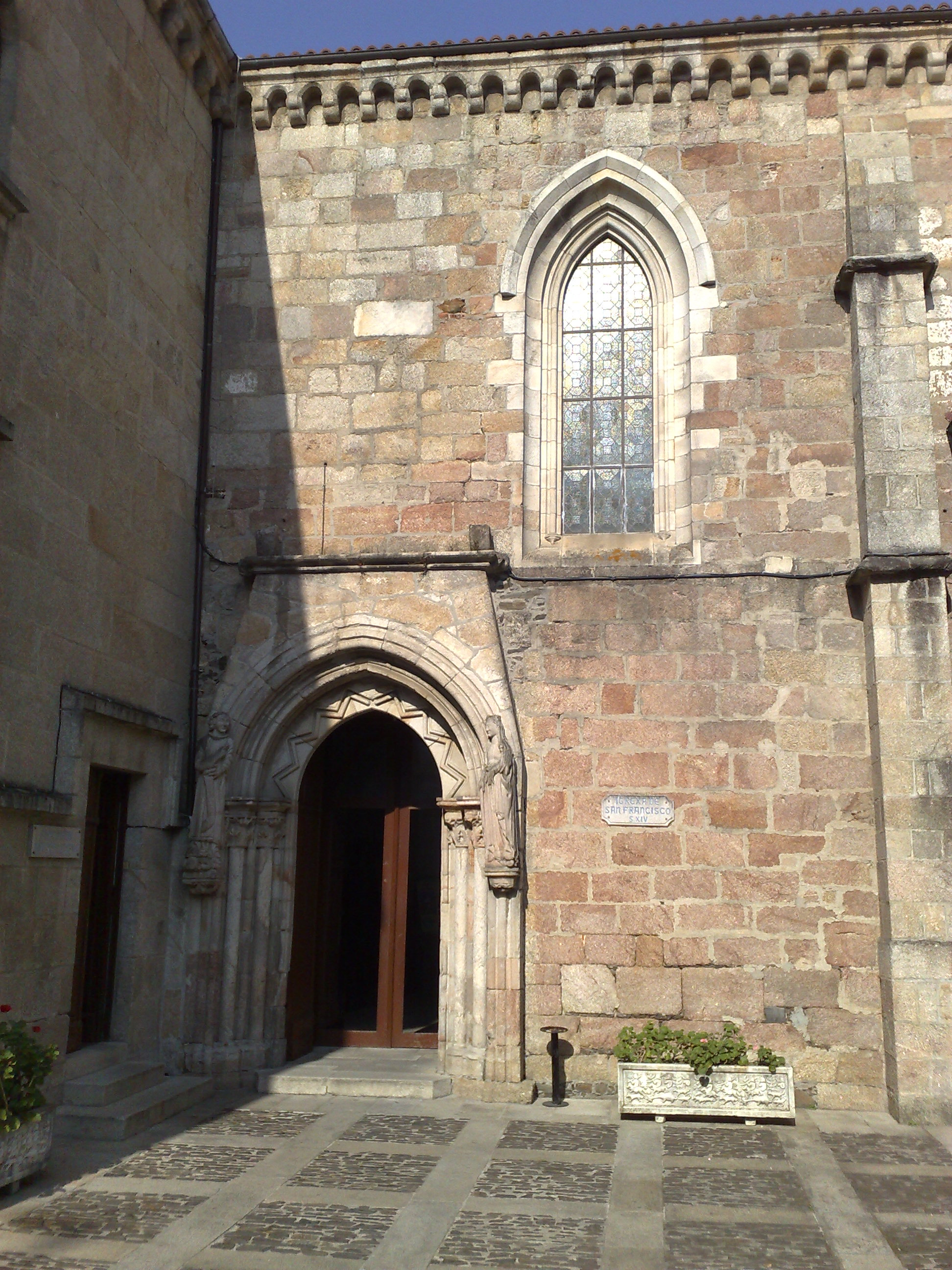 Igrexa de San Francisco de Betanzos